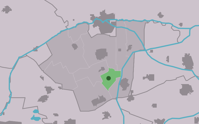 Kaartsje fan himrik fan De Falom